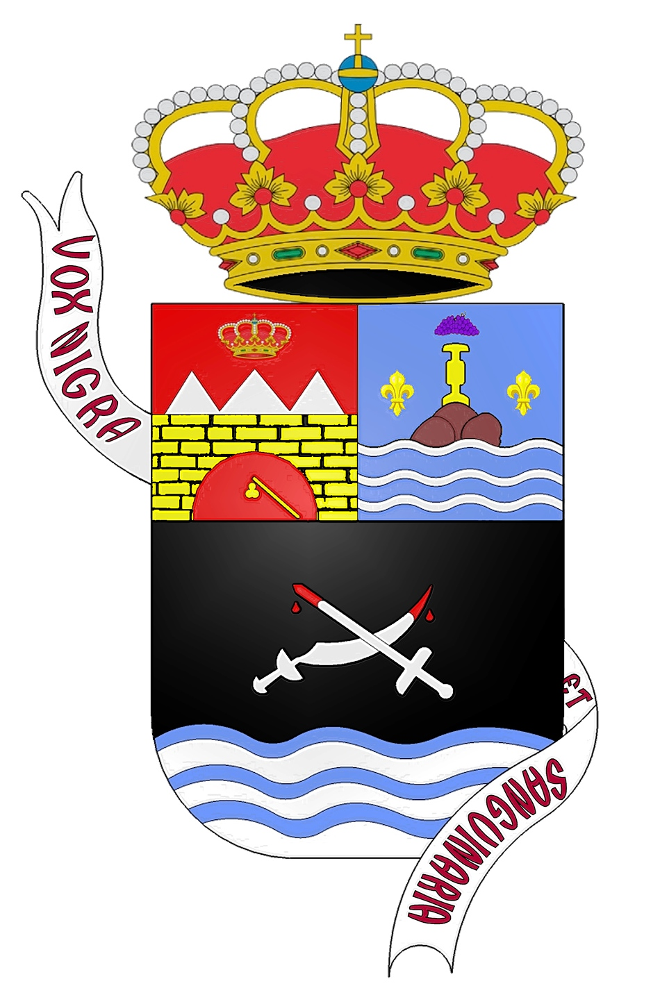 Breve explicación del escudo de Sangonera la Seca, aprobado en Pleno de la Junta Municipal el 30 de marzo de 2004 Cuartel superior izquierdo: En plata, tres montañas de sal con tres coronas reales, que simbolizan a las Salinas Reales de Sangonera. Están sobre el puente romano (Pontarrón) en oro. Bajo el puente una vara de pastor con su calabaza, que simboliza la Vereda Real de Ganados, el camino más antiguo de la comarca. Todo sobre fondo de gules. Cuartel superior derecho: Es el escudo nobiliario de la familia Rocamora, que ostentaba el señorío de la Villa de la Voz Negra o Villanueva de Sangonera. Sobre ondas de azur y plata se eleva una roca y sobre ella un roque en oro. Sobre el roque una racimo de moras. Dos flores de lis en oro flanquean el roque. Todo sobre azur. La mitad inferior del escudo simboliza el origen del nombre de nuestro pueblo. Sobre ondas de azur y plata, el río Sangonera o Guadalentín y sobre fondo de sable, dos espadas cruzadas, una mora y otra cristiana, ensangrentadas en sus extremos. Esto representa a la famosa batalla de la que tanto se habló en la Edad Media, la batalla sangrienta que mantuvieron moros y cristianos en nuestra vega, que “por la sangre vertida, hoy se llama Sangonera”. Saavedra Fajardo dixit. Todo está timbrado con la corona real cerrada, propia de la monarquía española y con una divisa que dice: “Vox Nigra et Sanguinaria”, en latín, los nombres de los dos pagos que dieron lugar a Sangonera la Seca. NOTA 1: El escudo respeta escrupulosamente las reglas de la heráldica. NOTA 2: Los colores en heráldica son: gules (rojo); azur (azul); sable (negro); sinople (verde)… Los metales son dos, oro (amarillo) y plata (blanco © Ginés Ros 2017